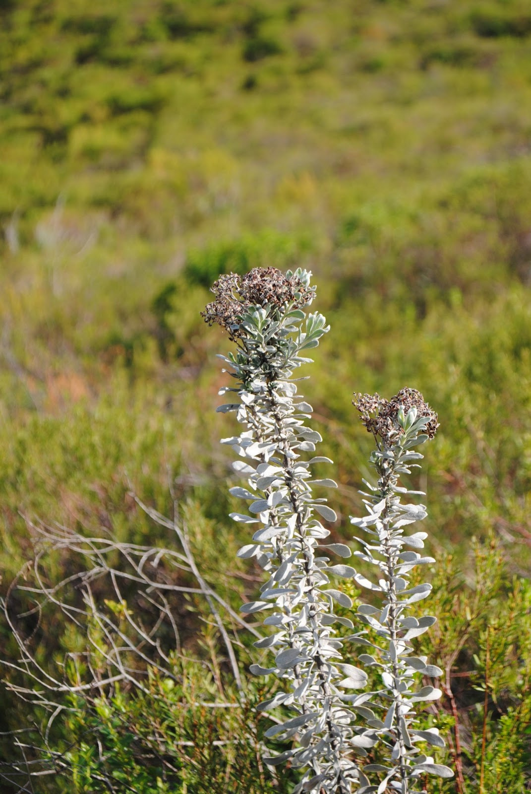 Eupatorium spathulatum. Asteraceae. Fotos tomadas en laderas de Cerros al margen de la Ruta 30 en Bajada de Pena, departamento de Rivera, Uruguay.